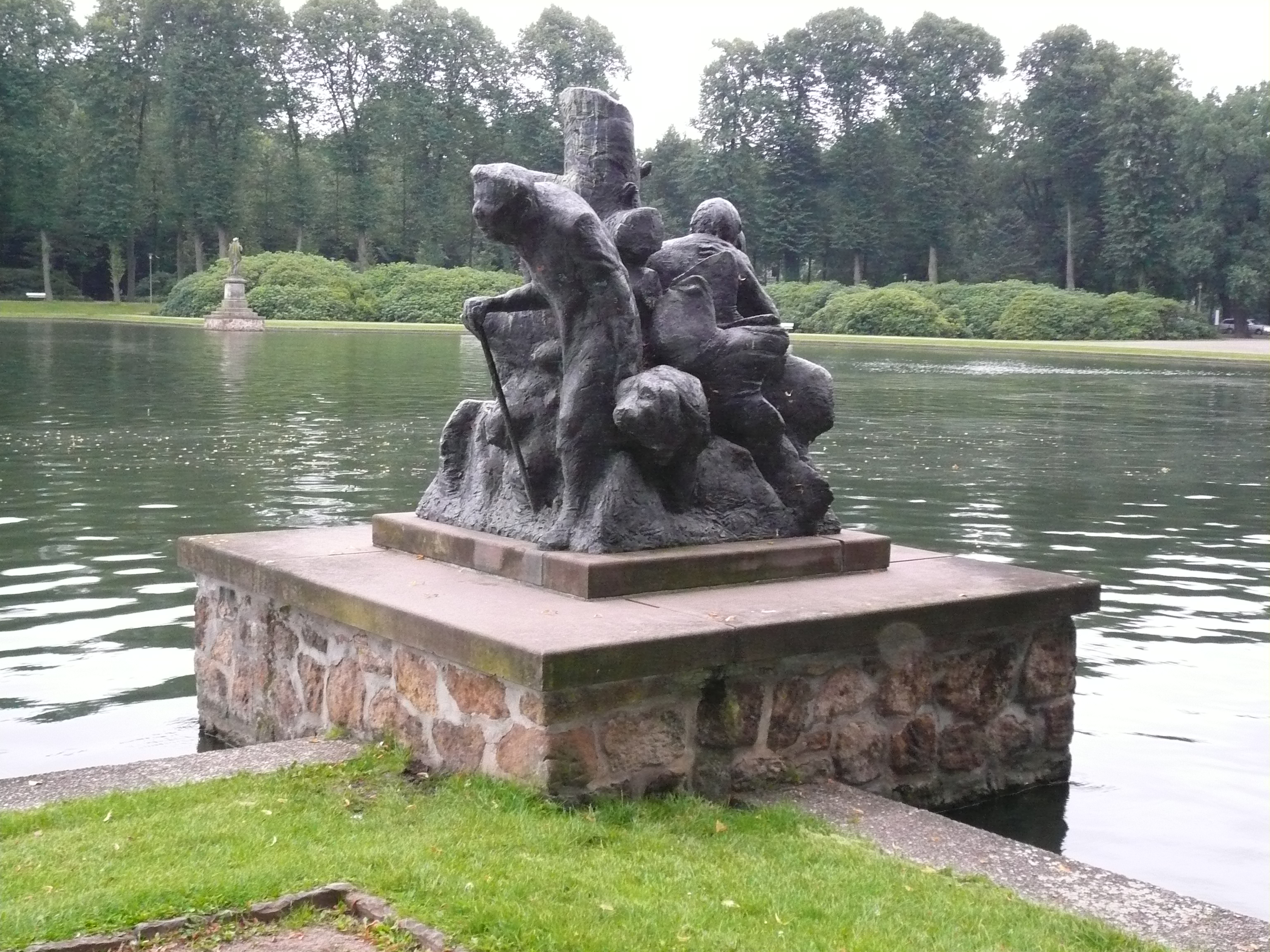 Skulptur am Hollersee in Bremen